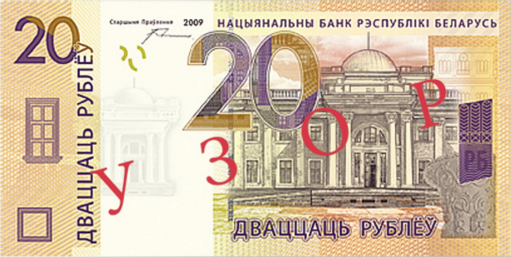 Купюра 20р